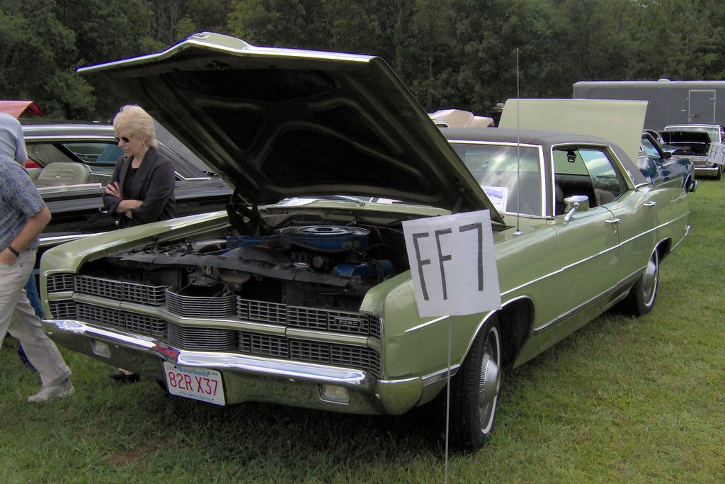 1969 Ford LTD 4-Door Hardtop